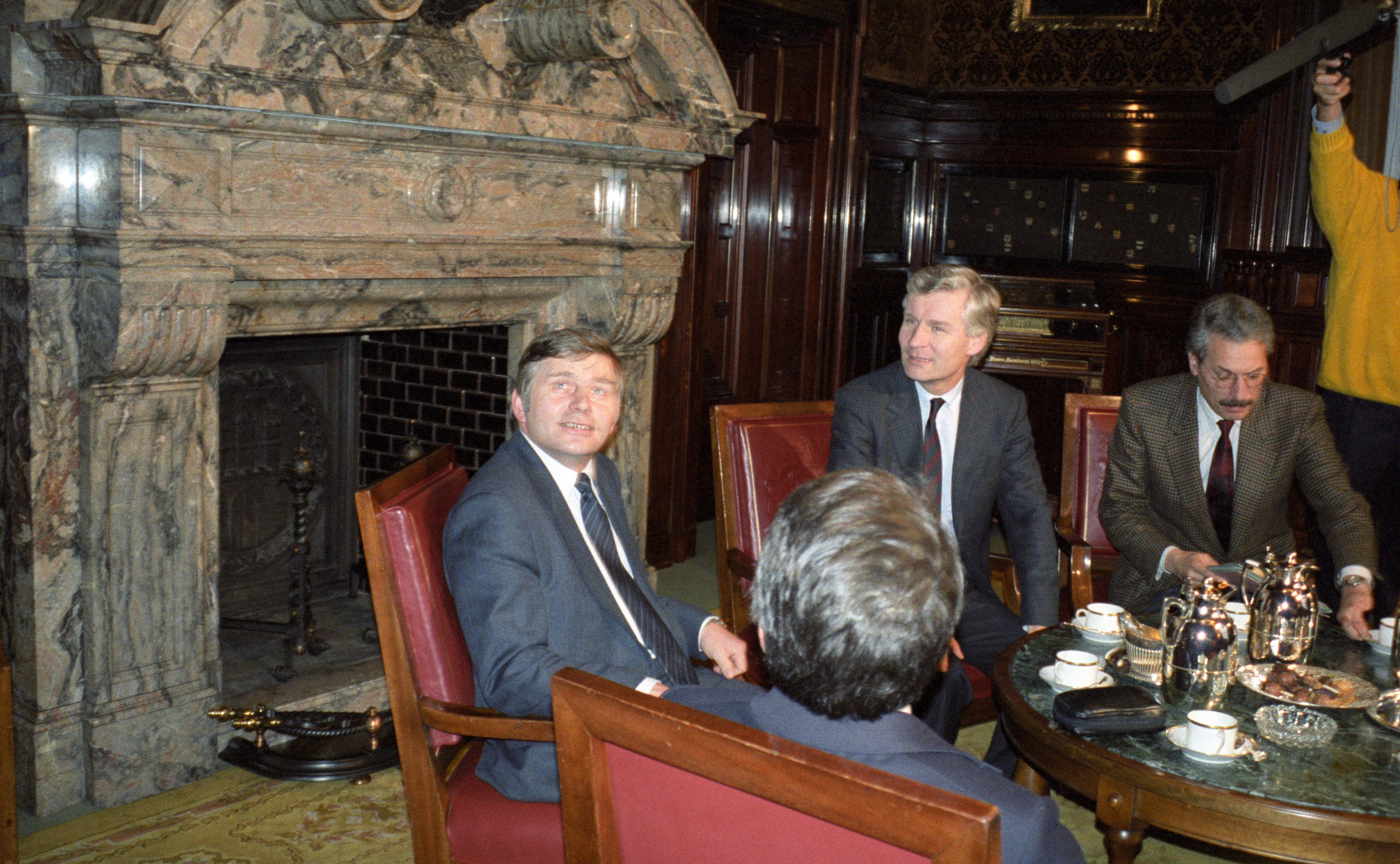 Ministerpräsident von Mecklenburg-Vorpommern Alfred Gomolka bei seinem ersten Besuch bei Hamburgs Erstem Bürgermeister Henning Voscherau im Hamburger Rathaus. Rechts Staatsrat Vahrenholt